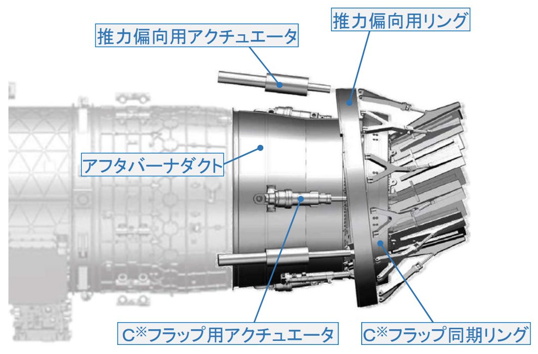 XVN3-1推力偏向ノズルのイラスト。防衛省の資料より写真のみ抜取